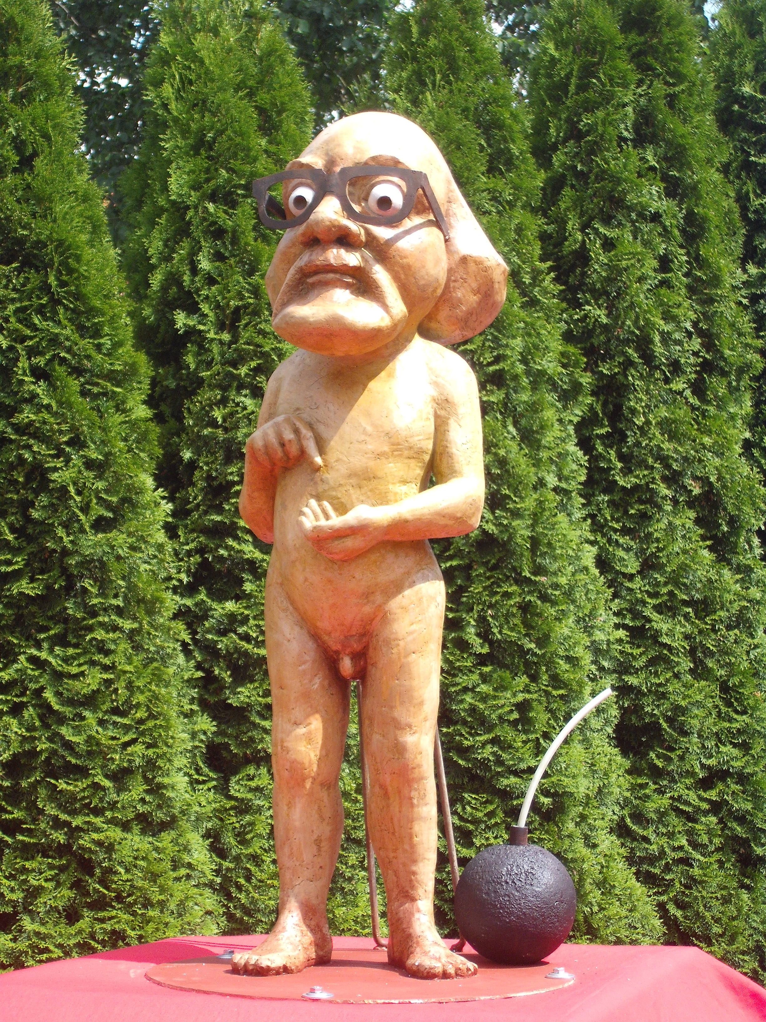 Obywatel Włapko - symbol skorumpowanego urzędnika